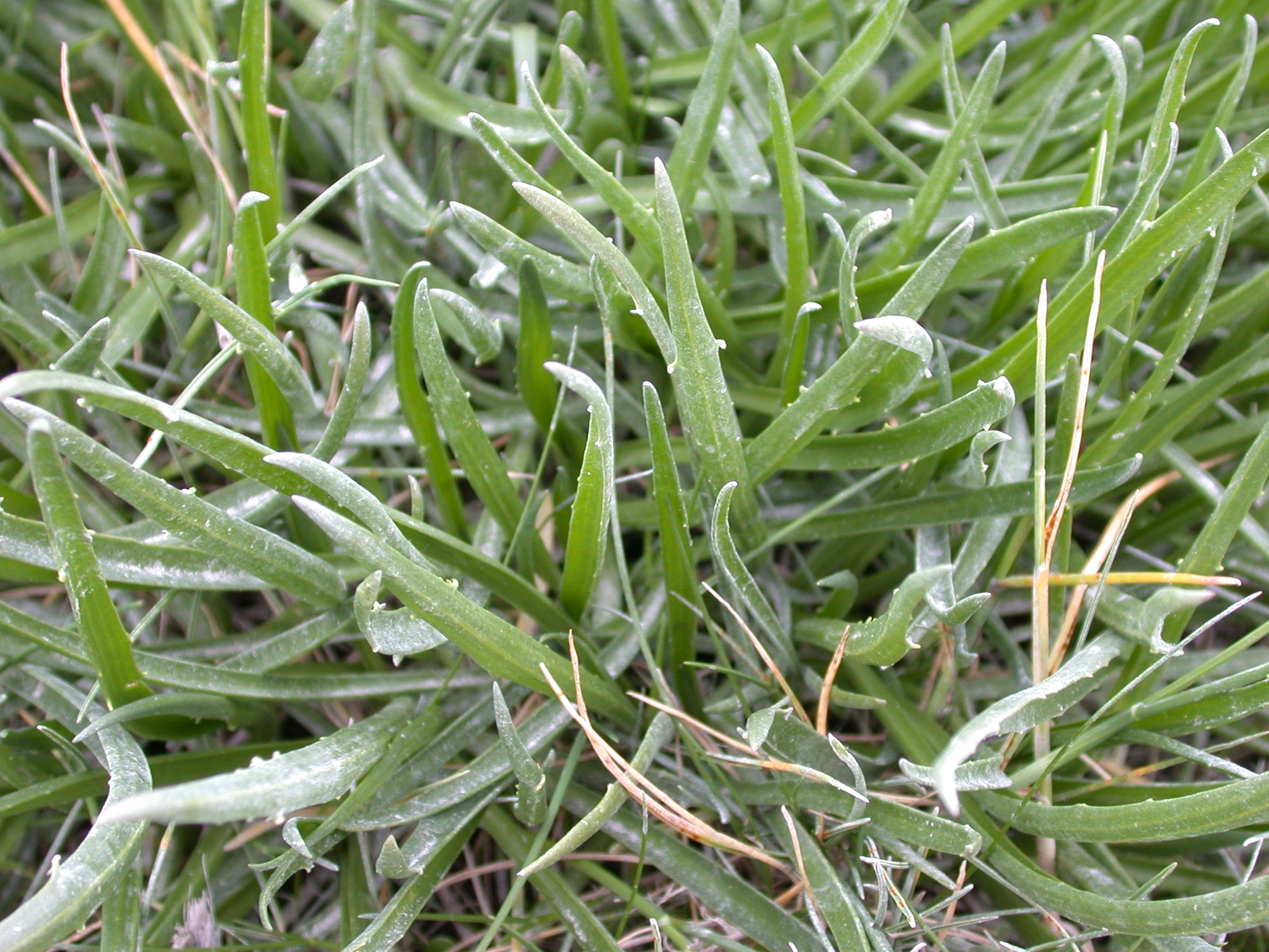 Plantago maritima Baie de Somme Nord de la Maye (Somme), France